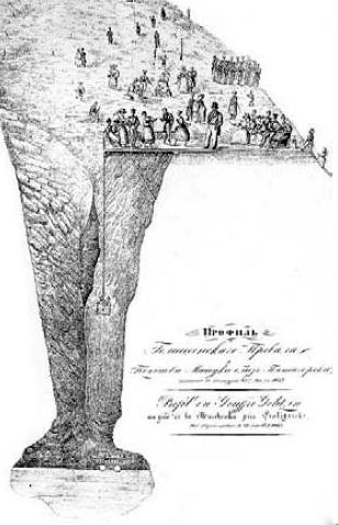 Профиль Голицынского Провала у подошвы Машуки близ Пятигорска